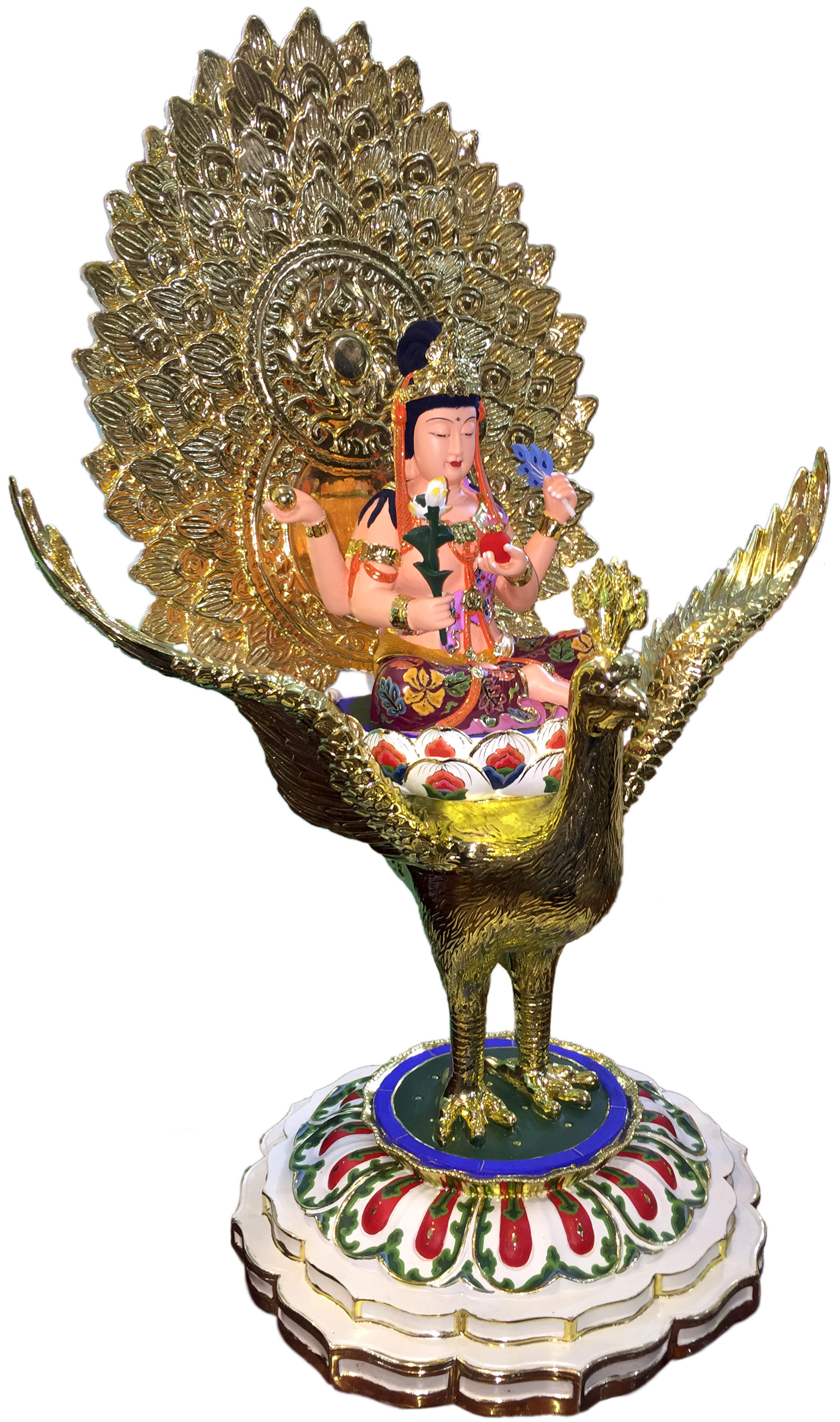 孔雀明王，2016年5月25日在潮州拍摄。